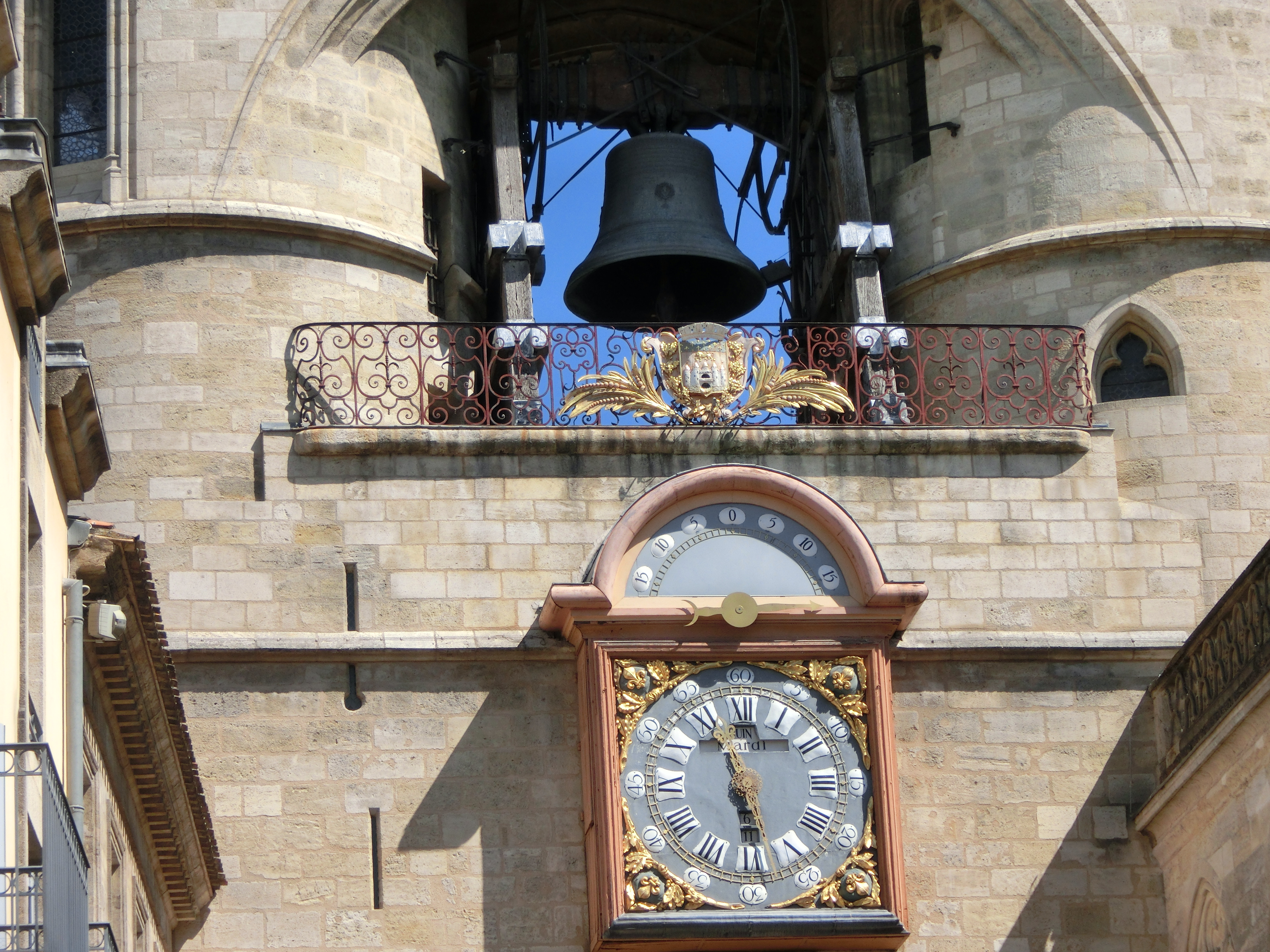 Grosse Cloche de la porte Saint-Eloi de Bordeaux.